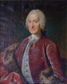 Johan Eskild de Falsen (1689-1758), Danish civil servant and landowner